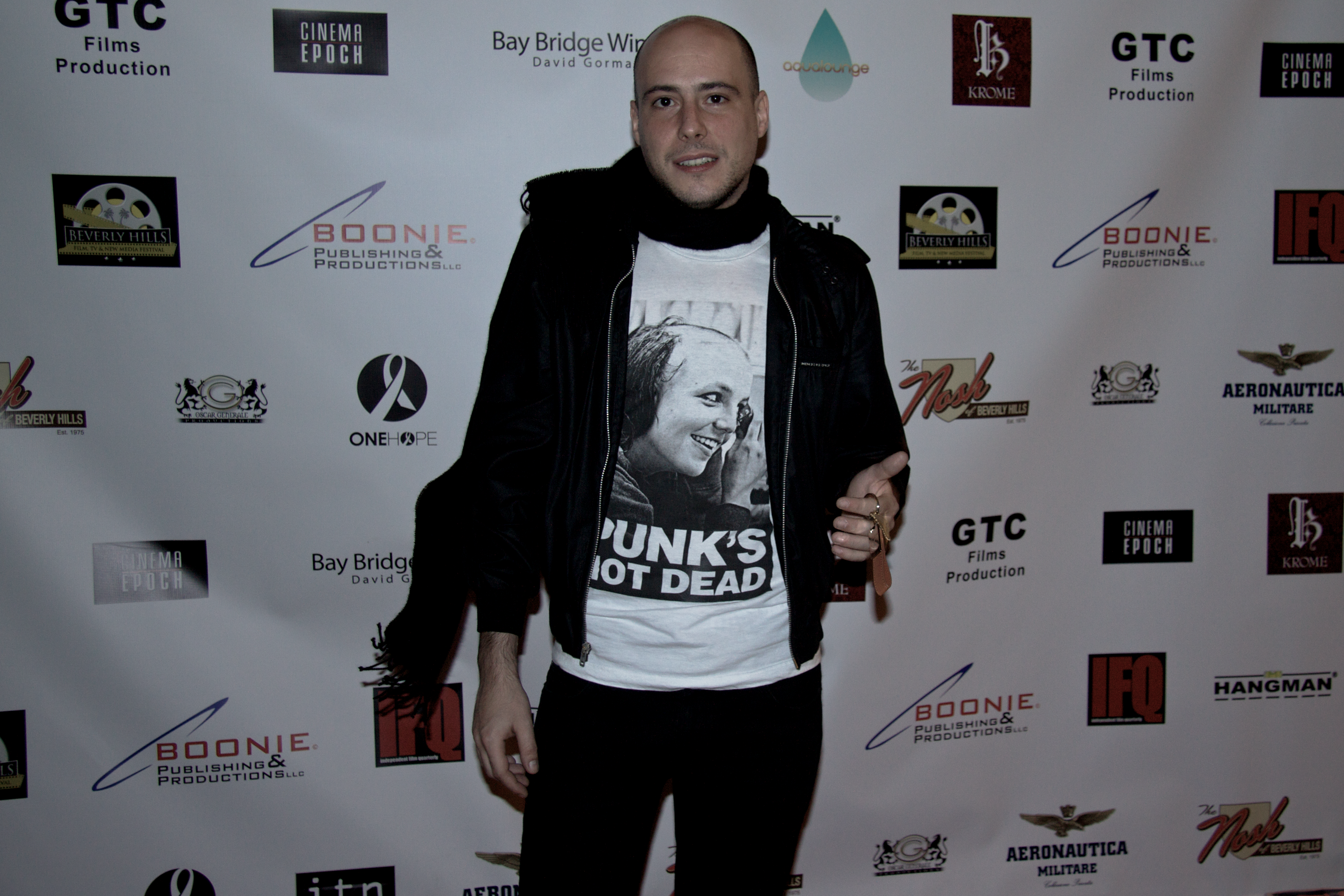 Gian Franco Morini